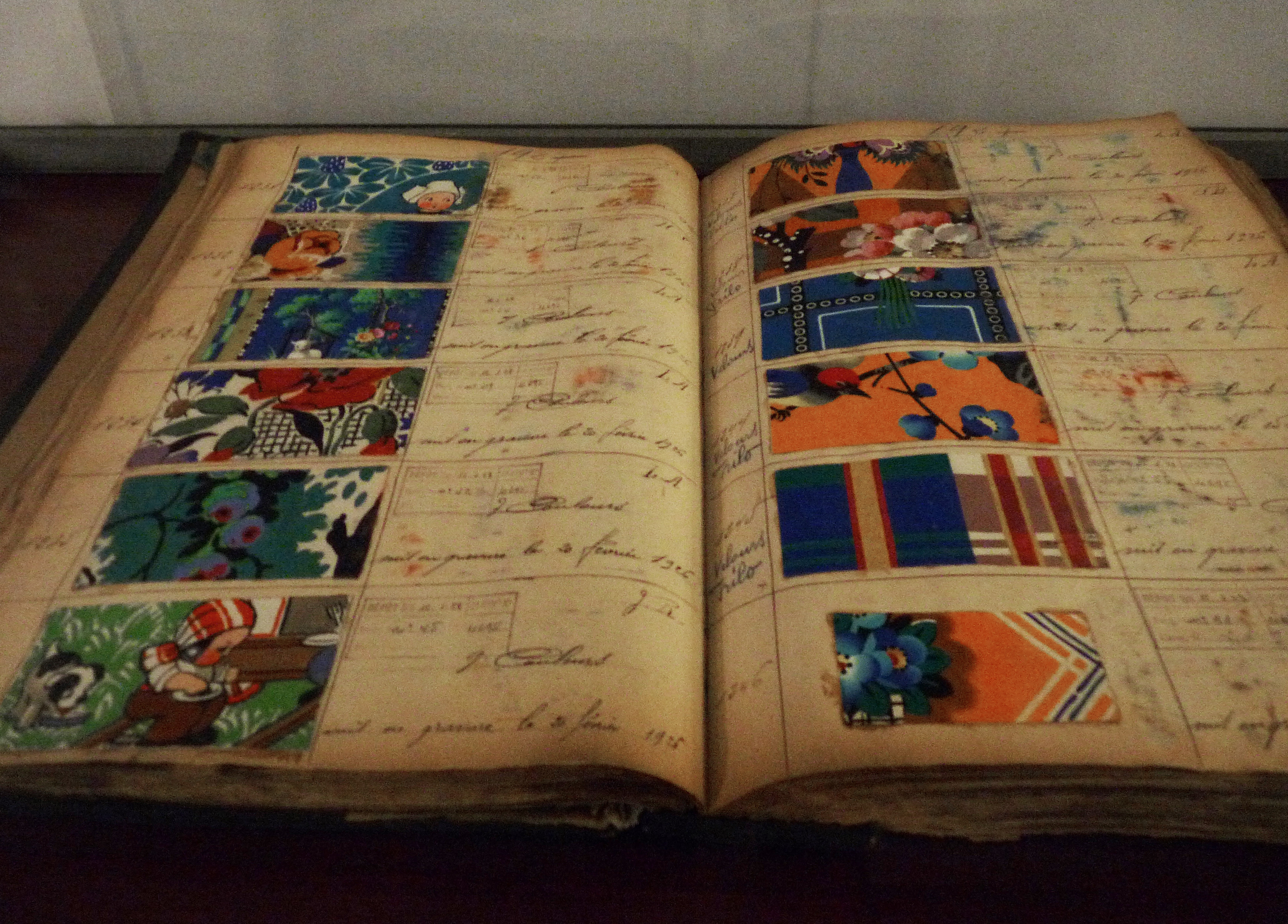 Livre d'échantillons de dessins pour tissu imprimé. Paris, Société d'impression des Vosges et de Normandie, manufactures à Epinal et Bolbec. Années 1920. (Musée de l'impression sur étoffes de Mulhouse)